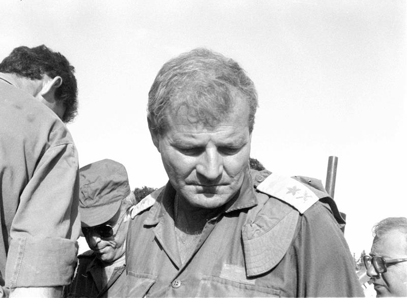 אסון צור השני, מפקד פיקוד צפון אלוף אמיר דרורי, במתקן צה"ל ושב"כ בצור.